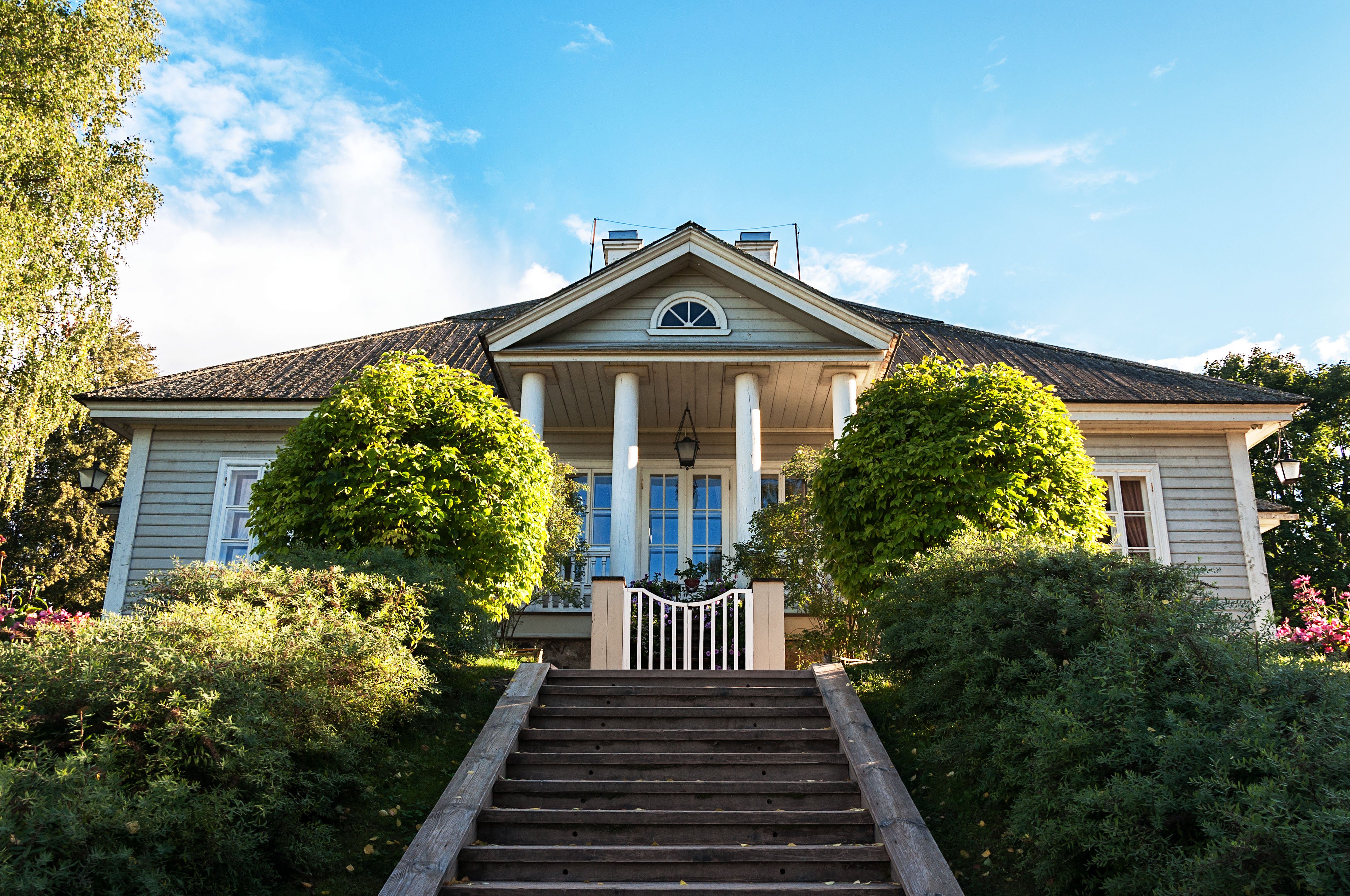 Михайловское заповедник: Пушкиногорский район, Псковская область This image is related to the protected area of Russia number 6000325